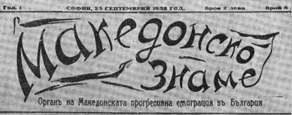 Главата на вестник "Македонско знаме".